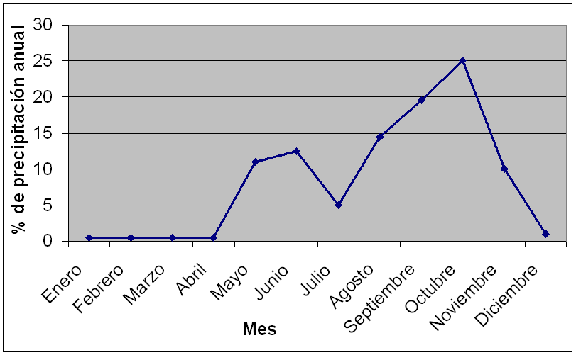 Precipitación anual en Barranquilla, Colombia. Los datos exactos son presentados mas abajo.